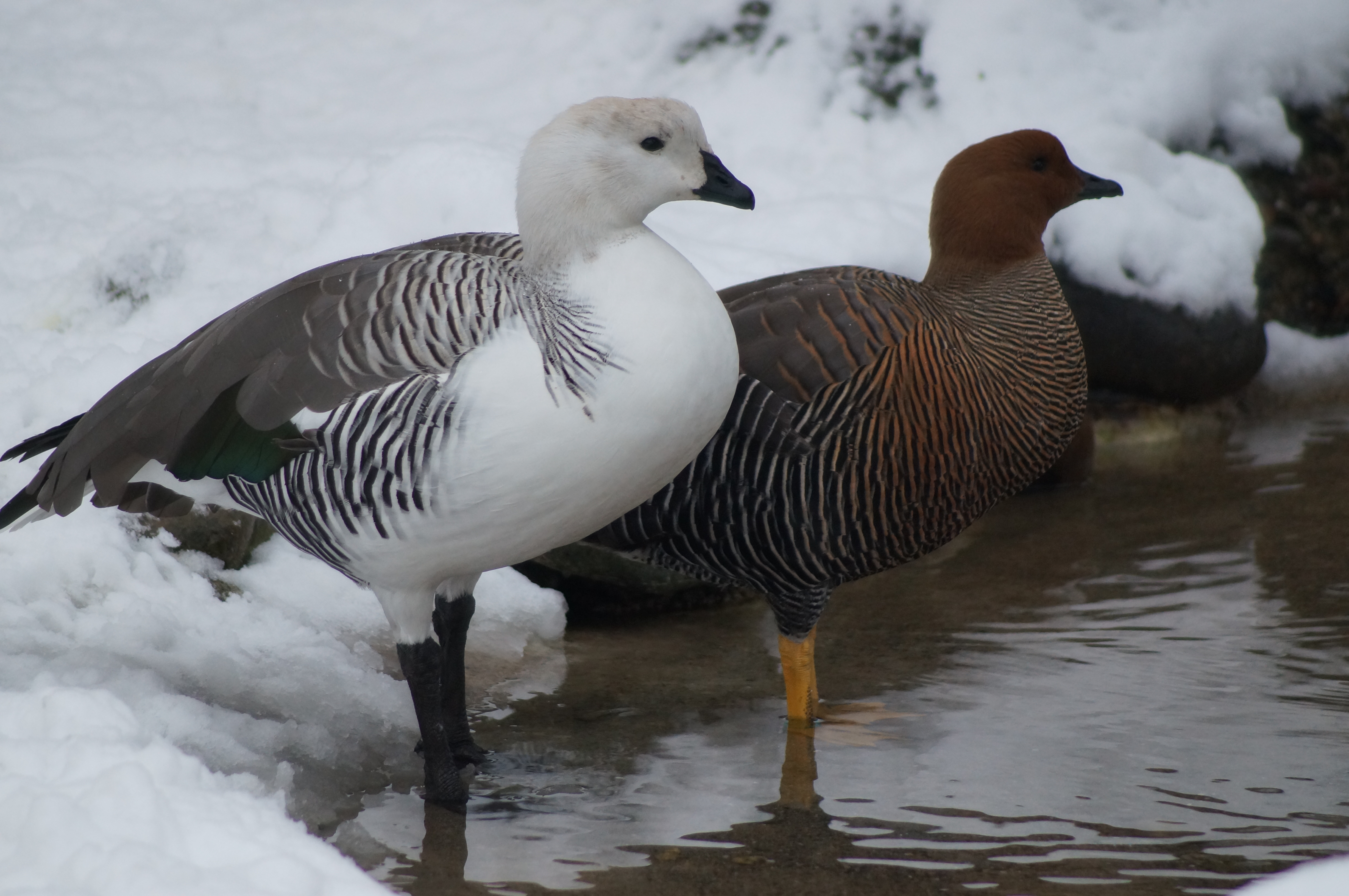 Zoo Zürich Magellangänse